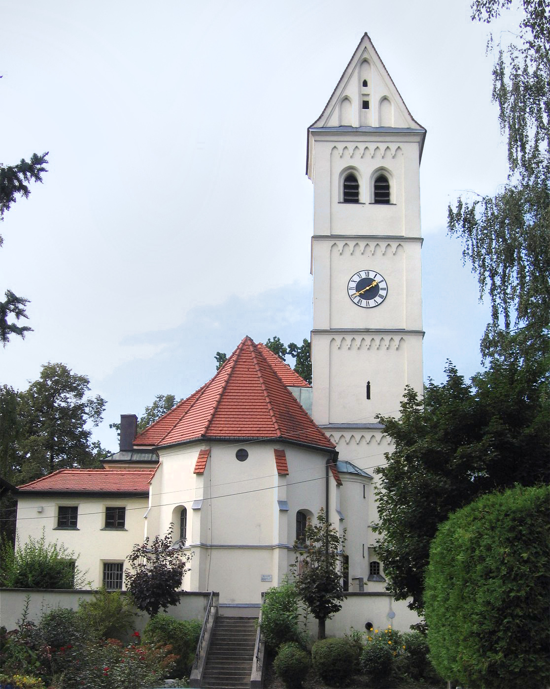 St. Michael in München-Lochhausen